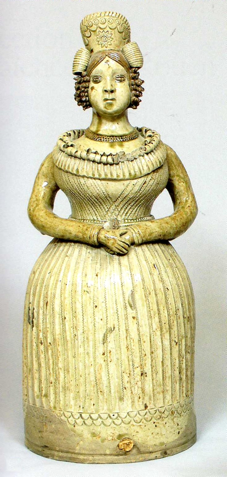 Fontaine en terre vernisée représentant une femme debout, atelier Talbot, XIXe siècle, La Borne, France.